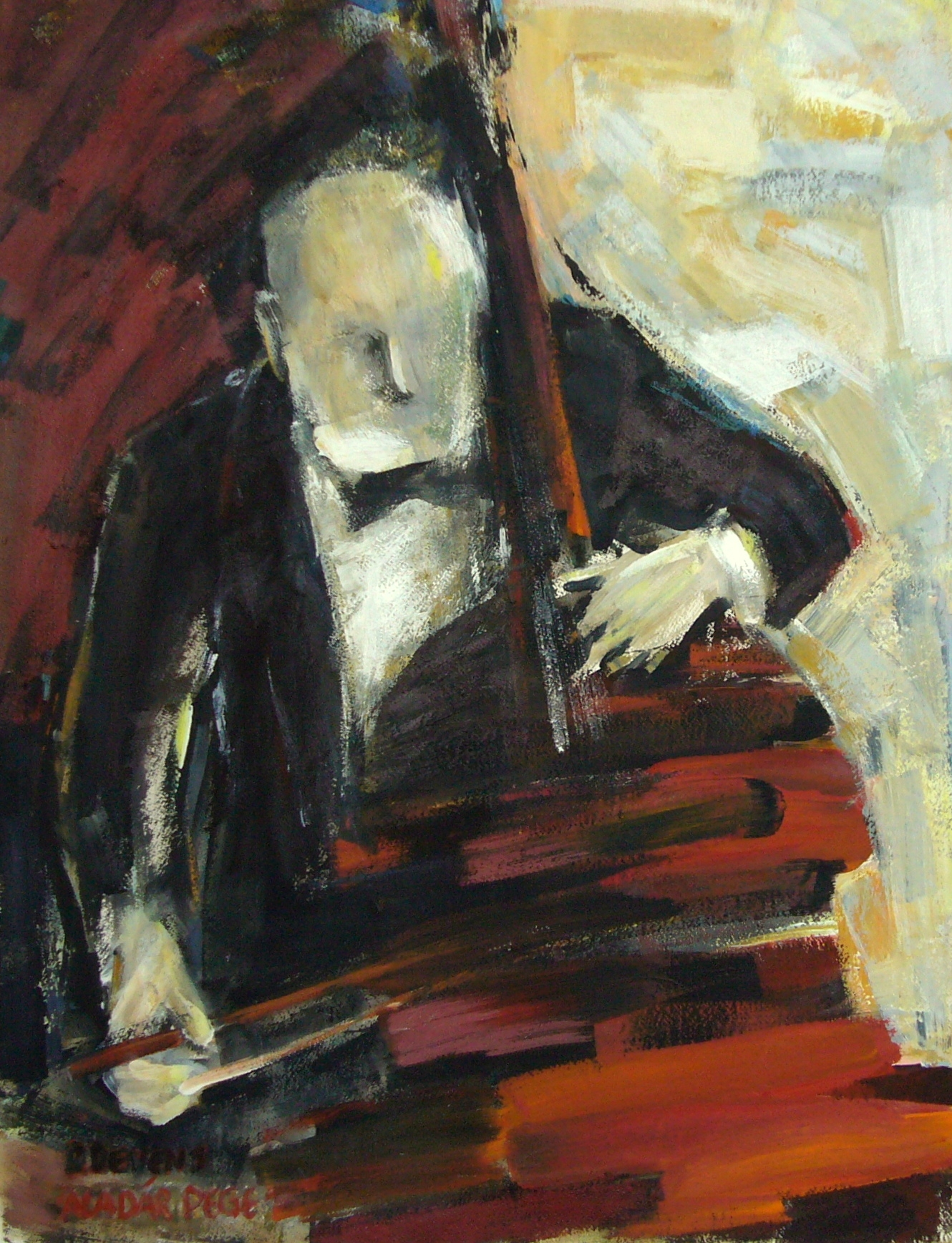 Rainer Devens: Aladár Pege, Bass